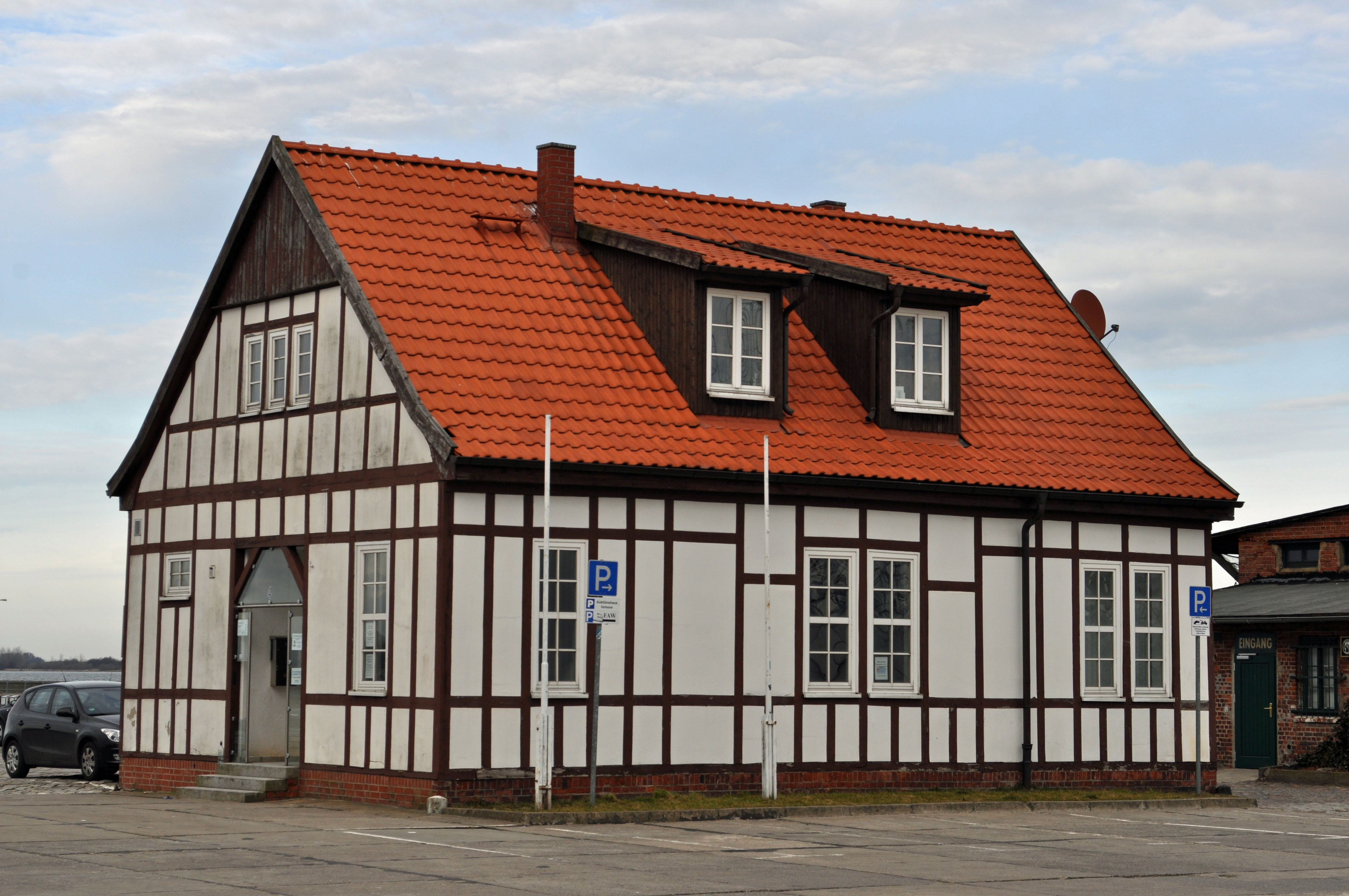 Gebäude bzw. Gebäudedetail in Stralsund. Straße und Hausnummer siehe Dateiname.